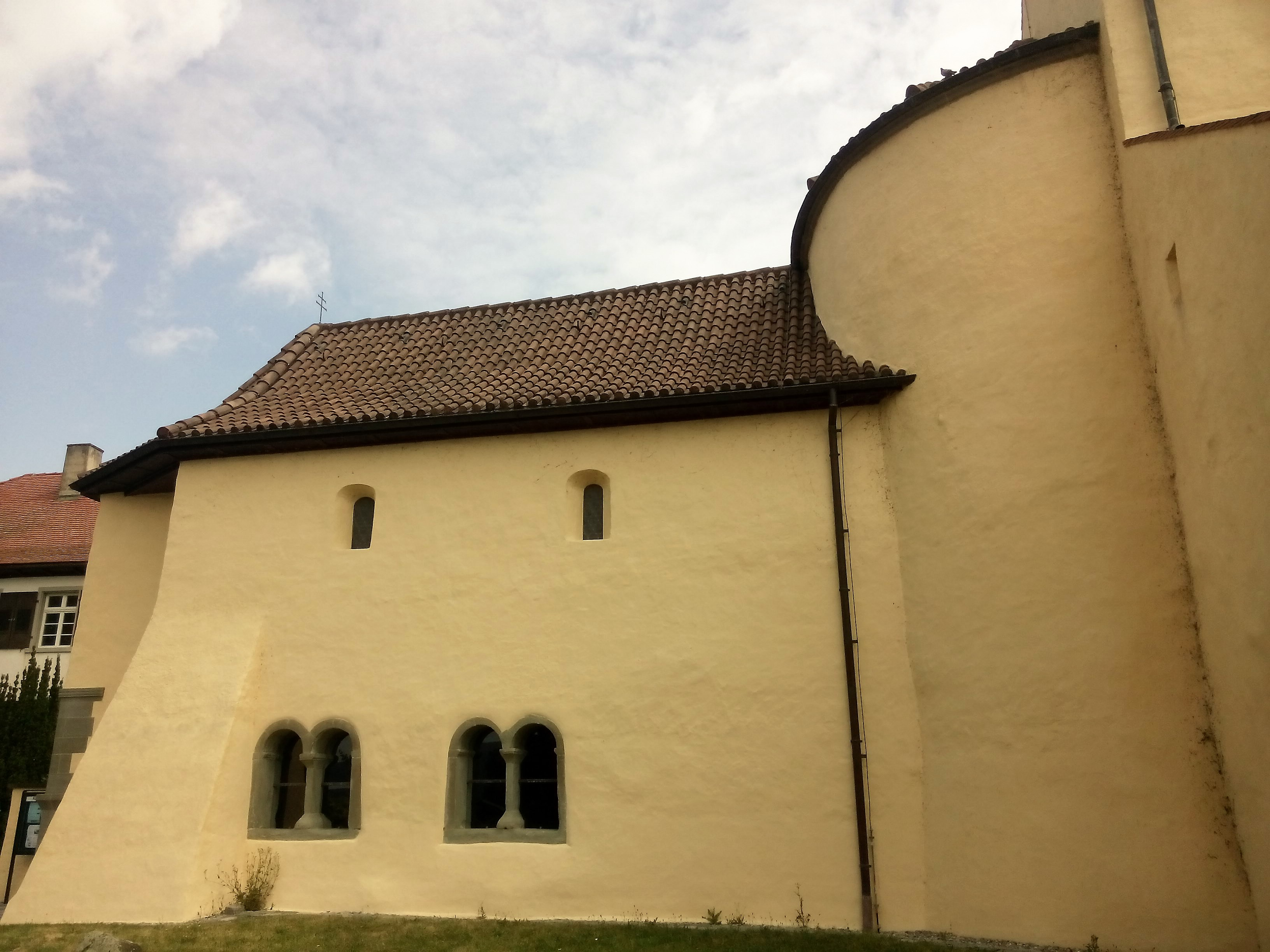 Südseite der westlichen Vorhalle an der Apsis